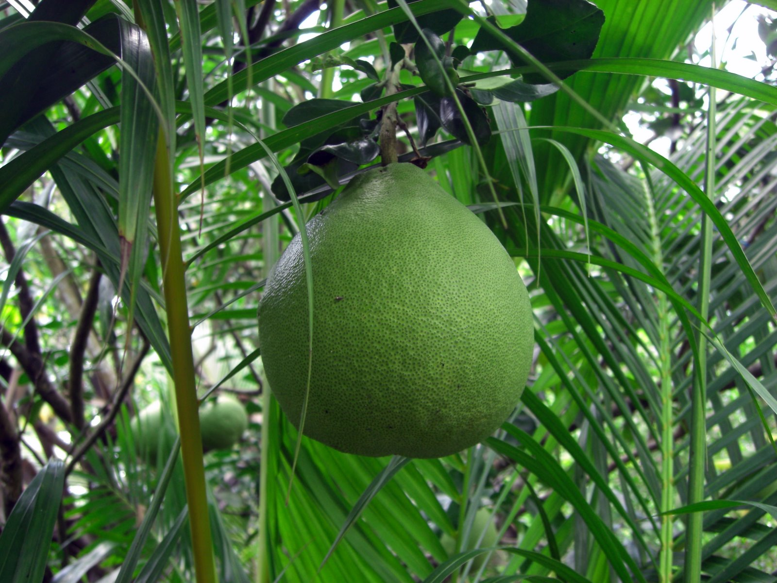 Citrus maxima au Vietnam